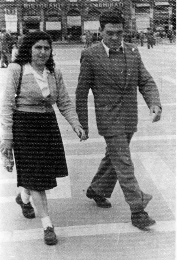 החבורה - מילאנו. חיה (חייל'ה) קוזלובסקי (גדעונית), יענקלה ארנון